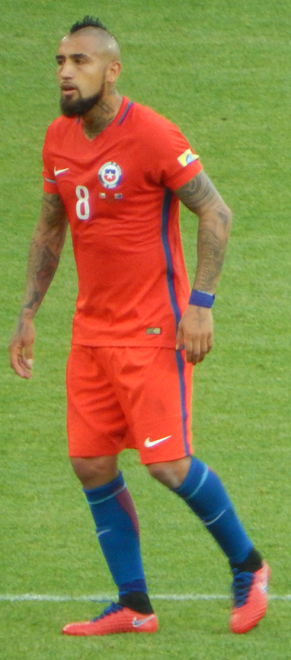 Артуро Видаль Матч Чили – Австралия